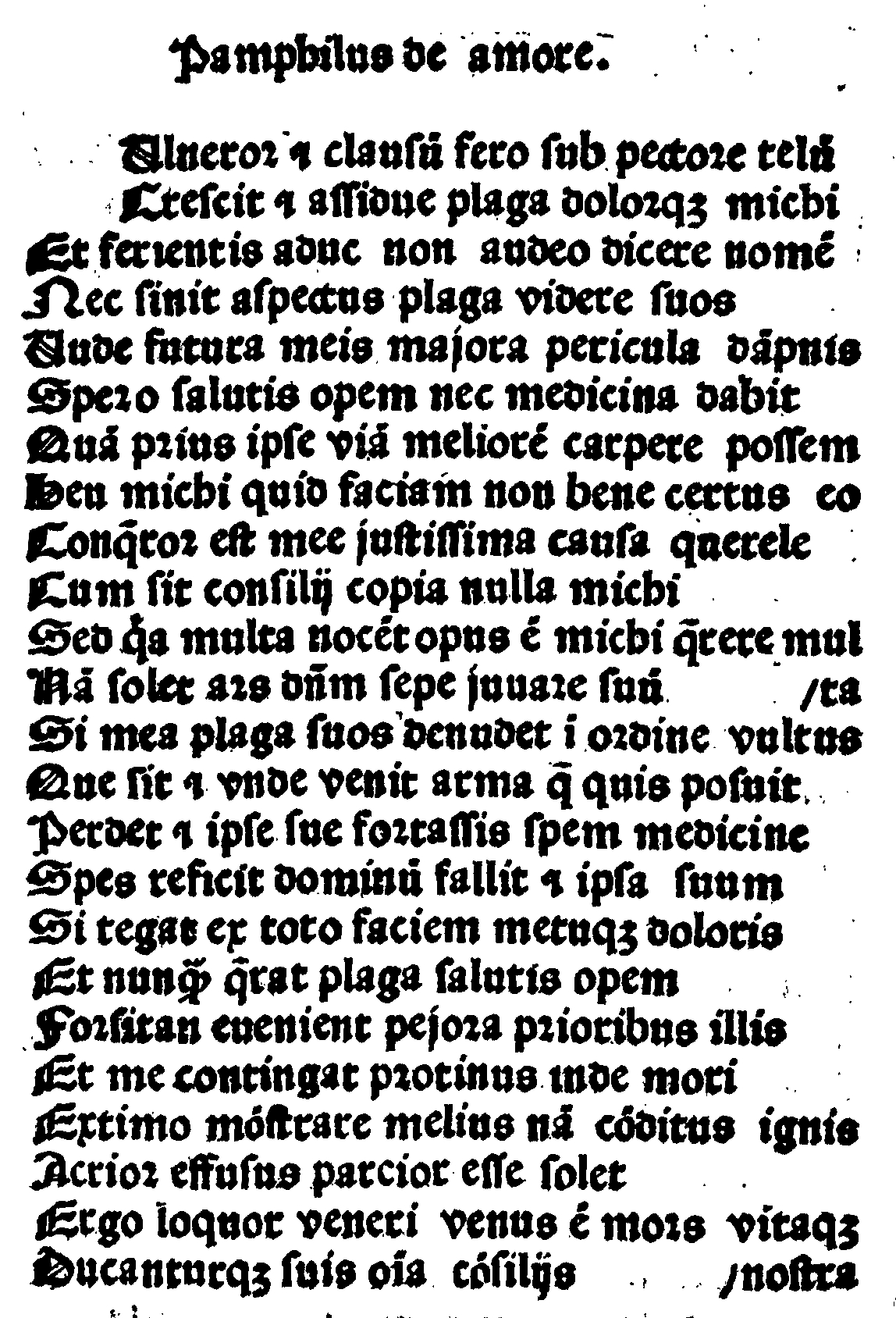 Pamphilus, Pamphilus de amore. Comoedia, Caesaraugustae, Paulus Hurus y Johannes Planck, 1480-84. CCPB000111519-7. Incunable I 279-2 de la Biblioteca de la Universidad de Zaragoza.